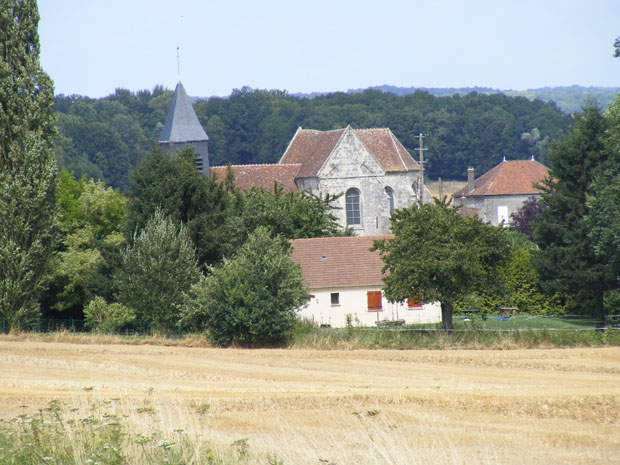 Village de Montolivet